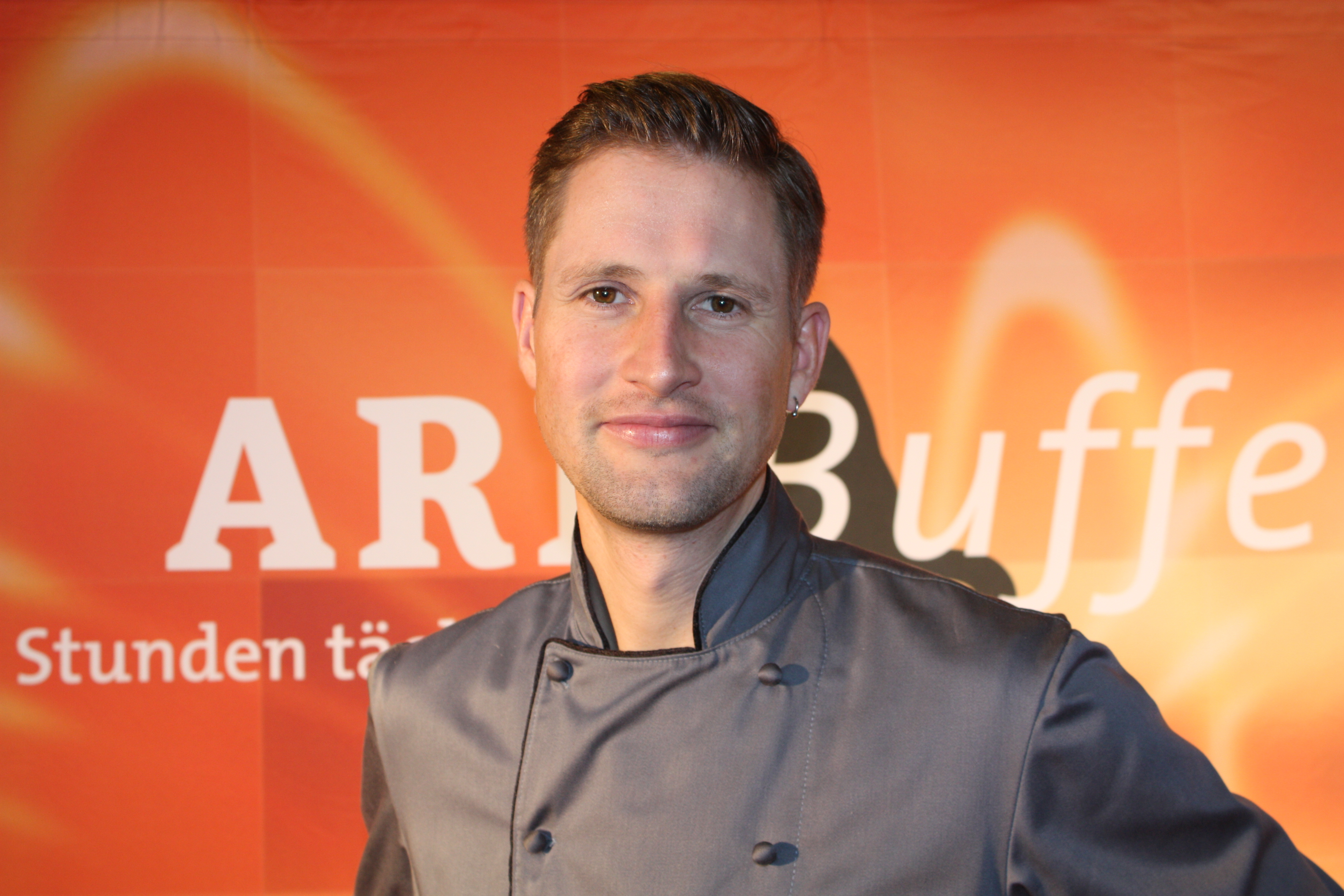 Internationale Funkausstellung 2012 , ARD-Buffet